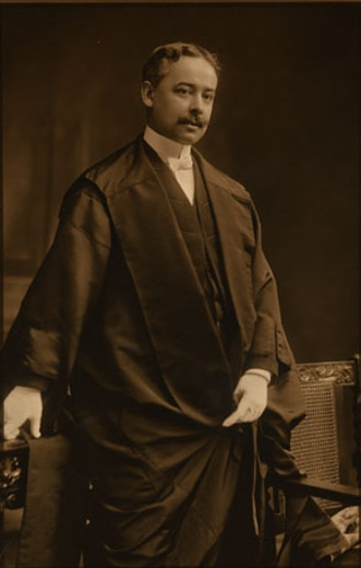 Antonin Galipeault (1879-1971)